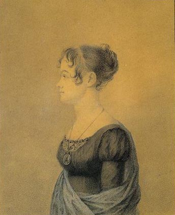 Варвара Александровна Ржевская, ур.Римская-Корсакова (16.11.1784 - 30.05.1813), была замужем за Александром Алексеевичем Ржевским (26 марта 1781 — 2 июня 1807). Умерла от чахотки.